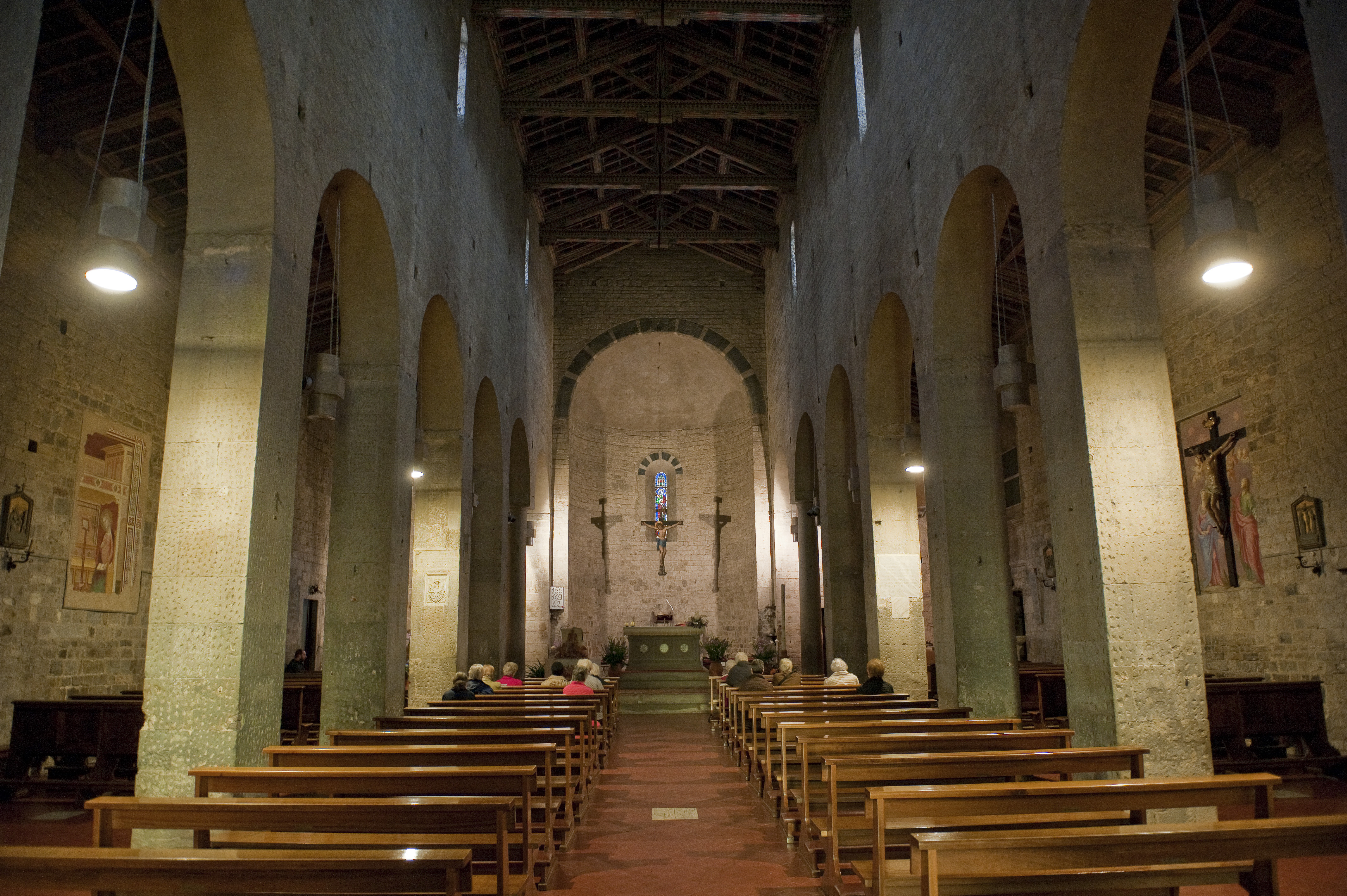 Interno della pieve di San Pietro a Ripoli (Bagno a Ripoli)